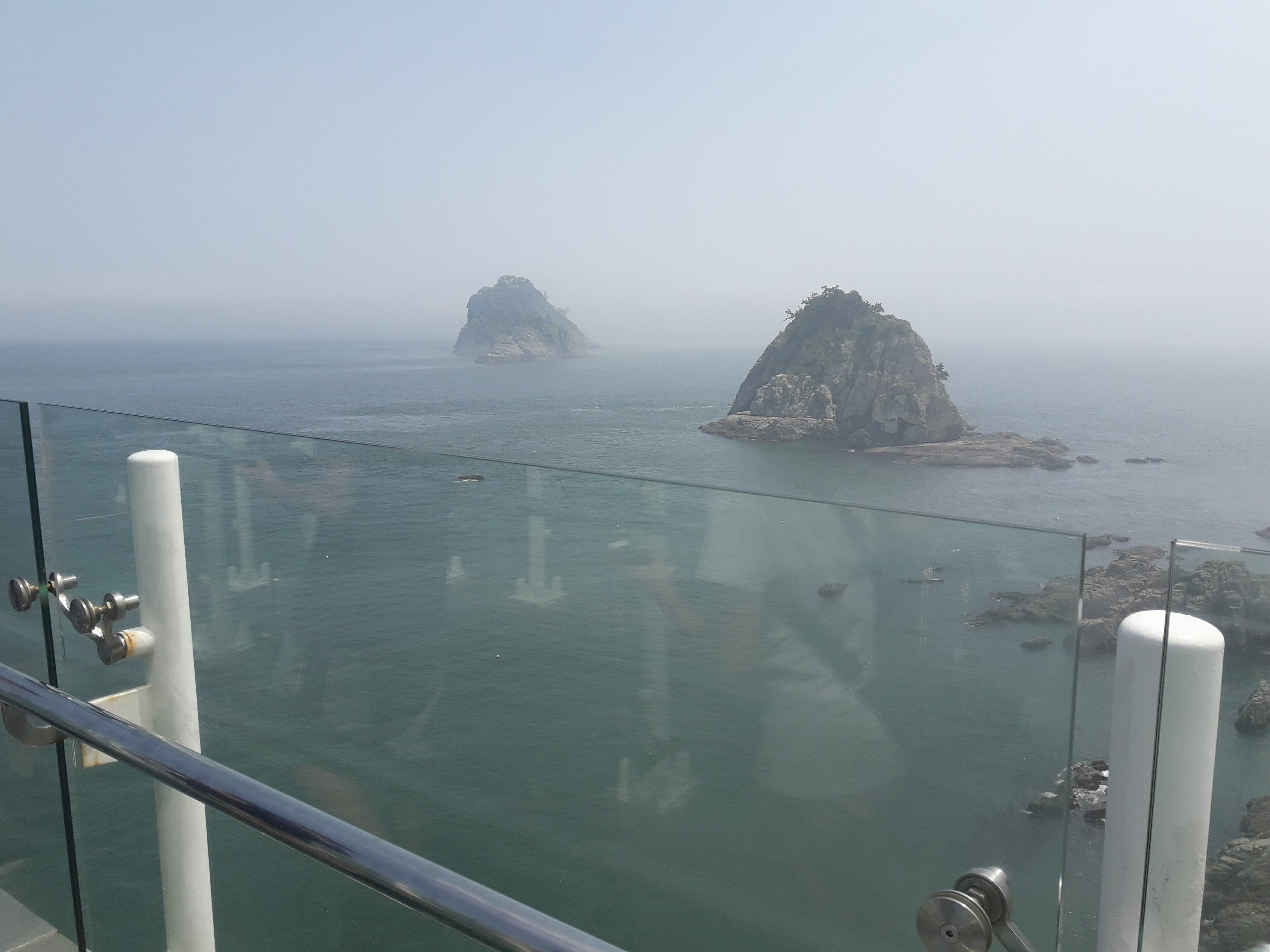 從五六島 Skywalk 天空步道上看五六島